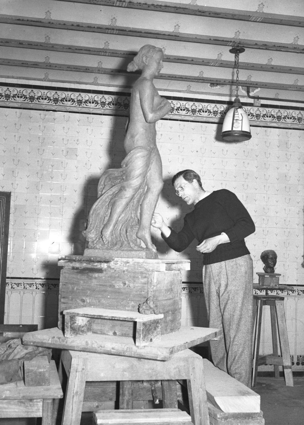 Beeldhouwer Starreveld in zijn atelier aan het werk aan het ontwerp voor het bevrijdingsmonument (na veel gedoe, want te bloot, uiteindelijk in 1950 geplaatst in het Julianapark in Schiedam), Amsterdam, 1946 Foto Ben van Meerendonk / AHF, collectie IISG, Amsterdam